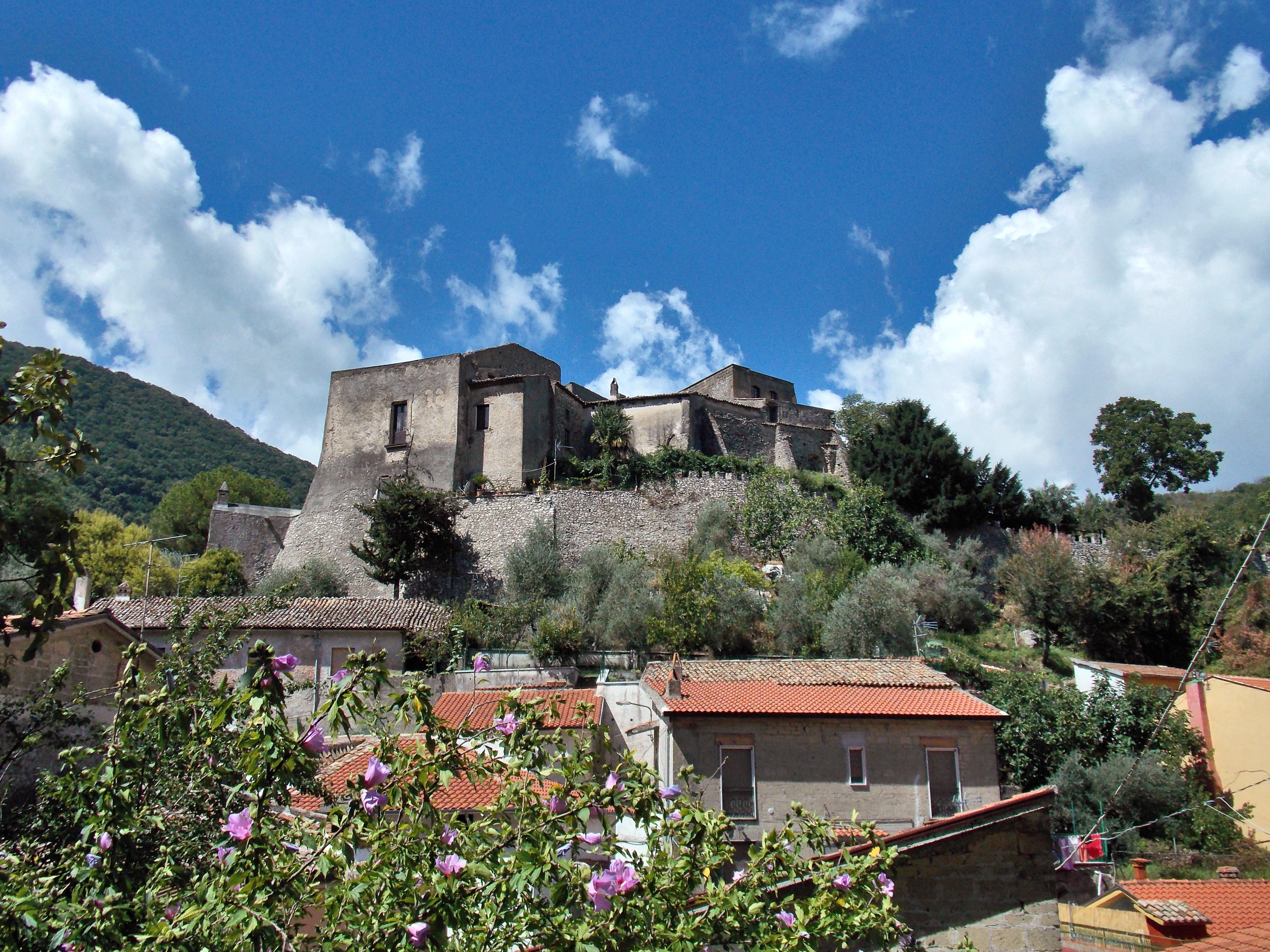 Castello Pignatelli della Leonessa a San Martino Valle Caudina (AV).